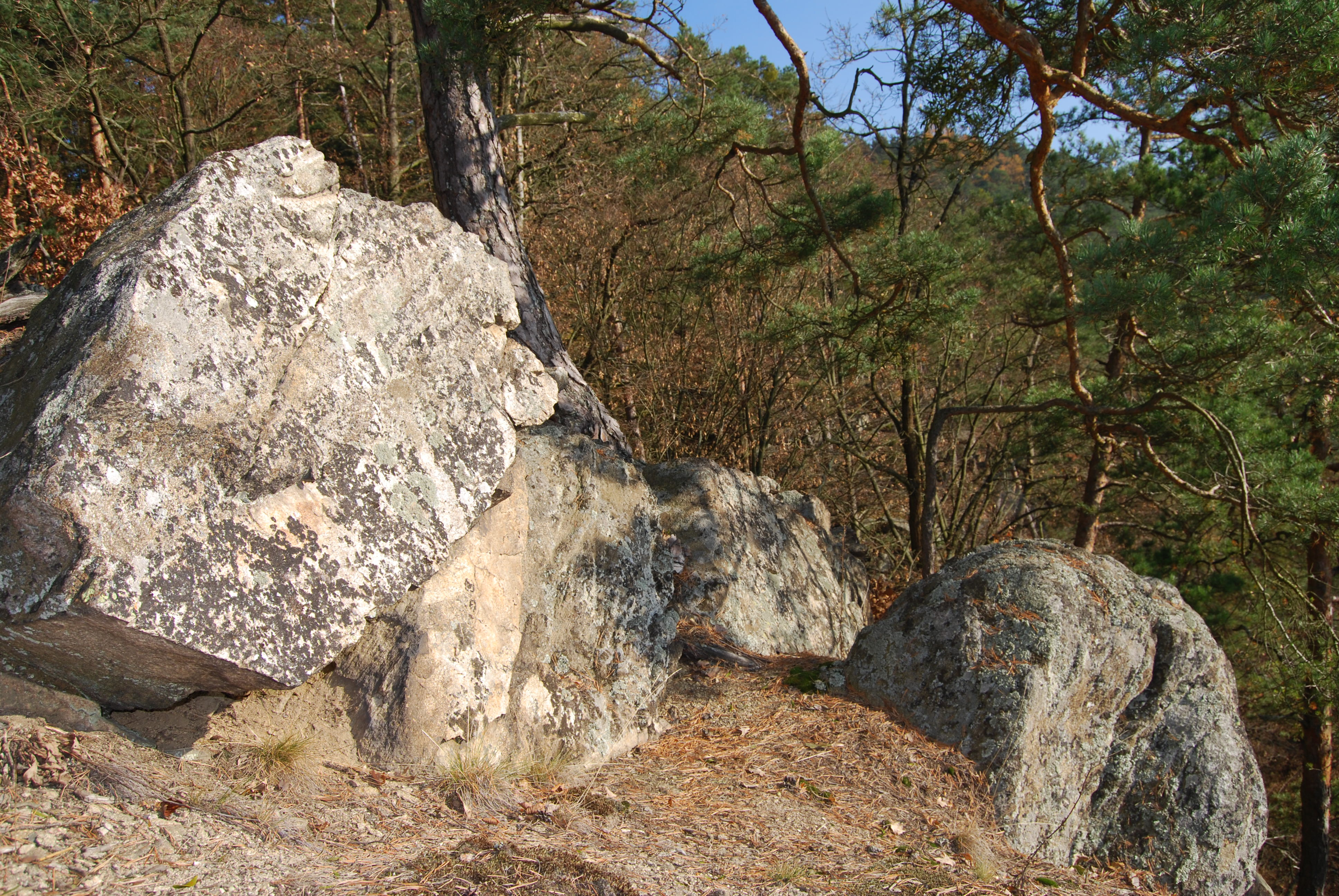 Přírodní rezervace Výří skály u Oslova, nedaleko obce Tukleky. Okres Písek. Česko.